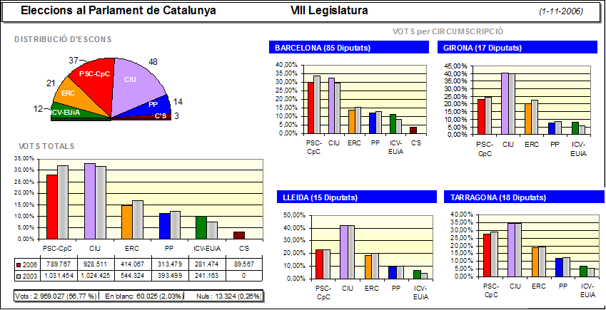 Gràfic resum dels resultats de les eleccions al Parlament de Catalunya 2006.